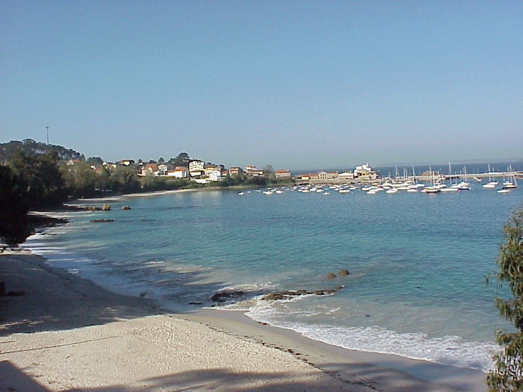 Praia de Aguete. Concello de Marín.